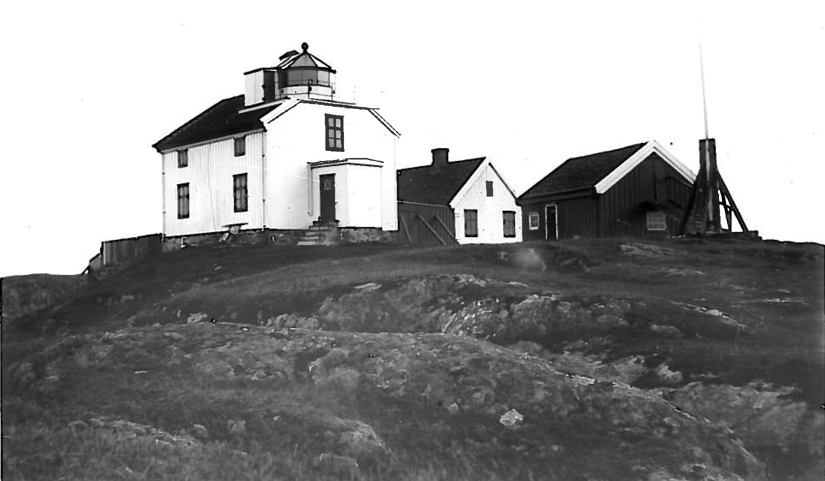 Prestøy, Nærøy. Bygget ca. 1866. Riksarkivet/Fyrdirektoratet - RA/S-1602/1/U/L0003/0028.